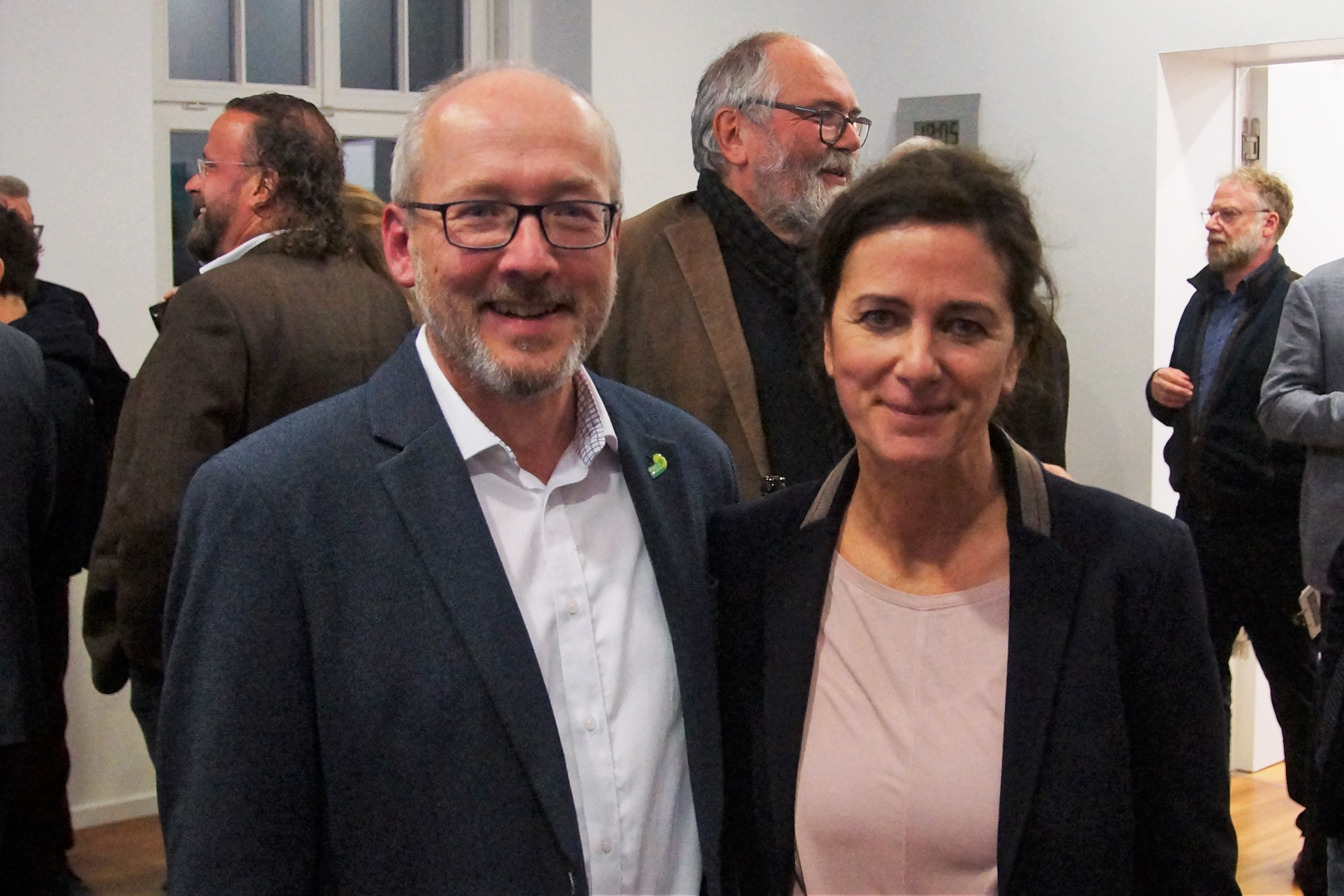 Silvia Brünnel und Markus Hofmann, Landtagsabgeordnete der Grünen in den beiden Fuldaer Wahlkreisen, am Wahlabend 2018 im Landratsamt Fulda